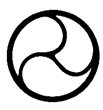 Símbolo ancestral